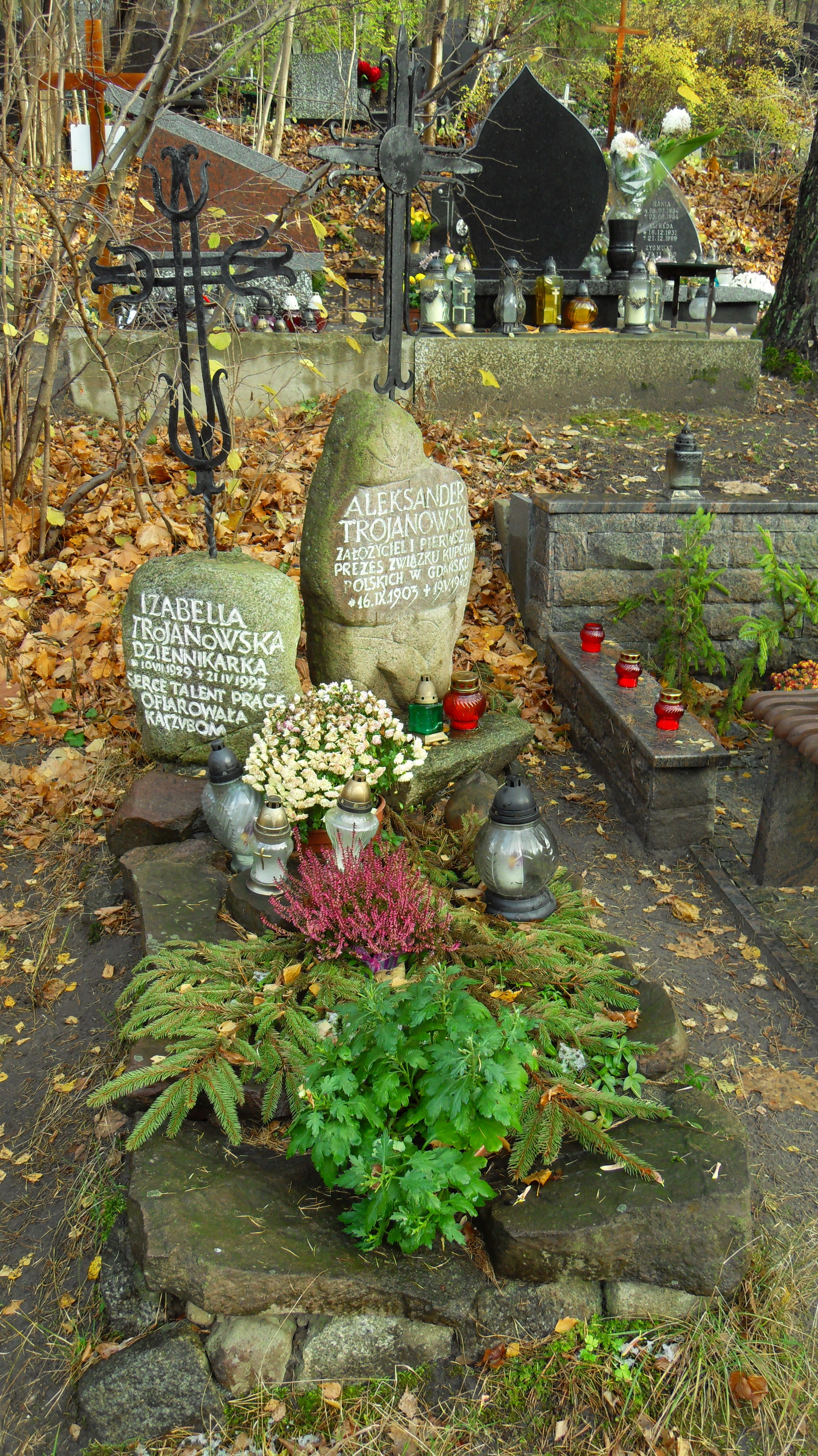 Gdańsk Wrzeszcz. Cmentarz Srebrzysko, grób Izabella Trojanowska i Aleksander Trojanowski.